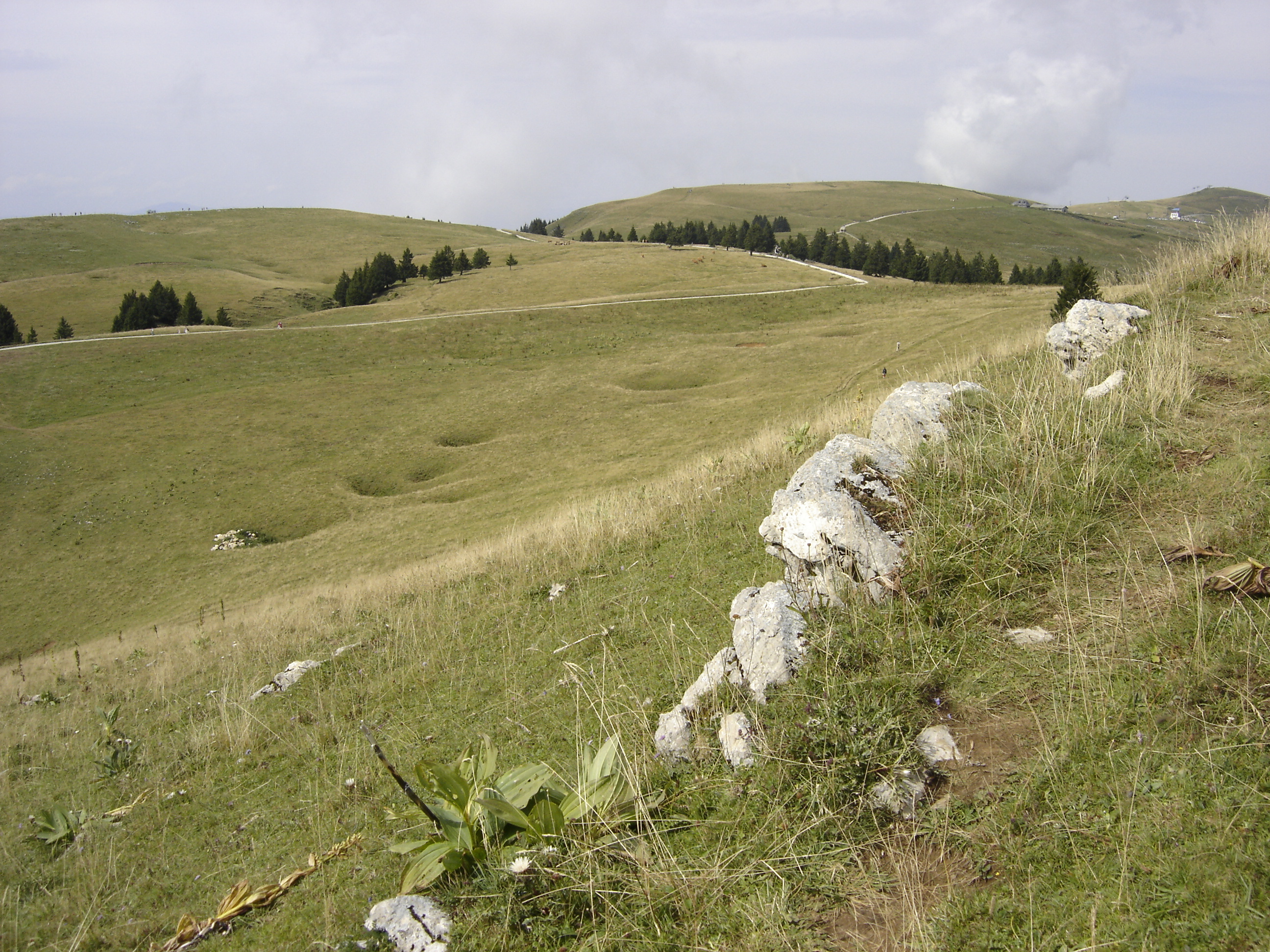 vue du plateau du Semnoz depuis le cret de l'aigle